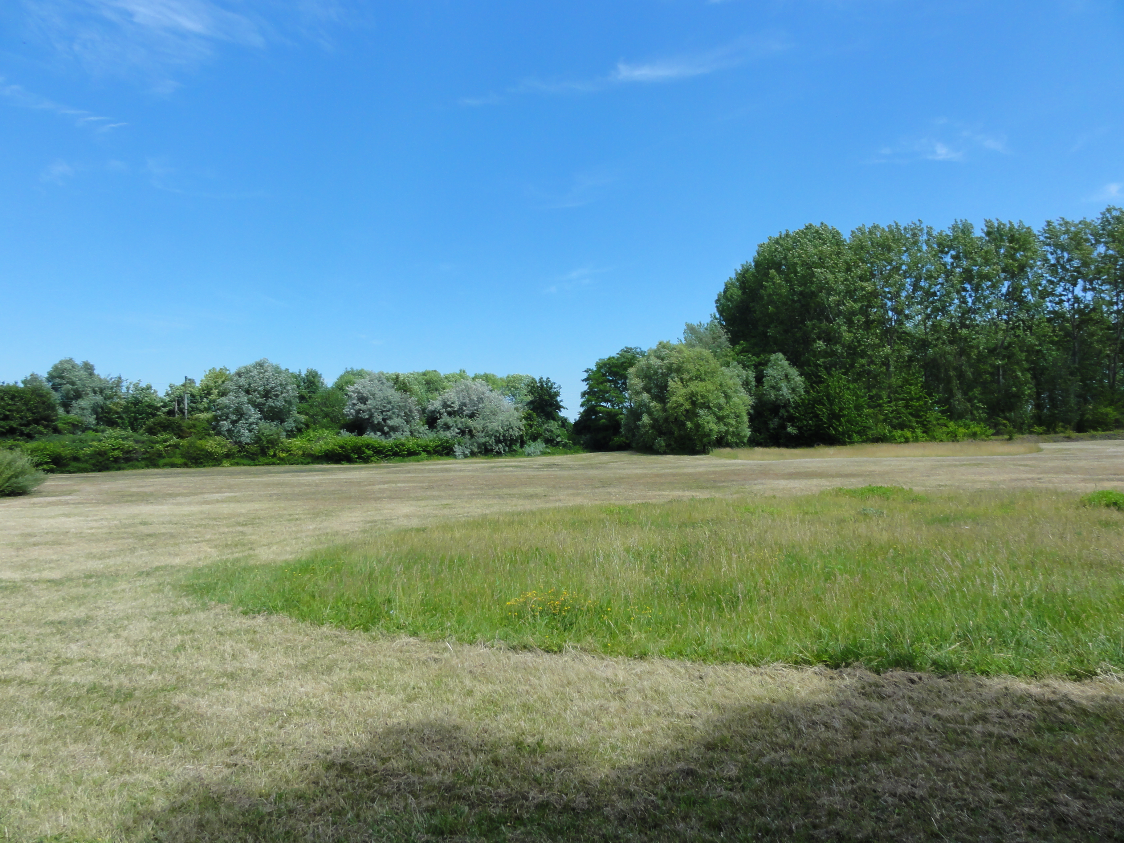 Terril n° 133 dit Dechy, disparu, Fosse Dechy de la Compagnie des mines d'Aniche, Dechy, Nord, Nord-Pas-de-Calais, France.